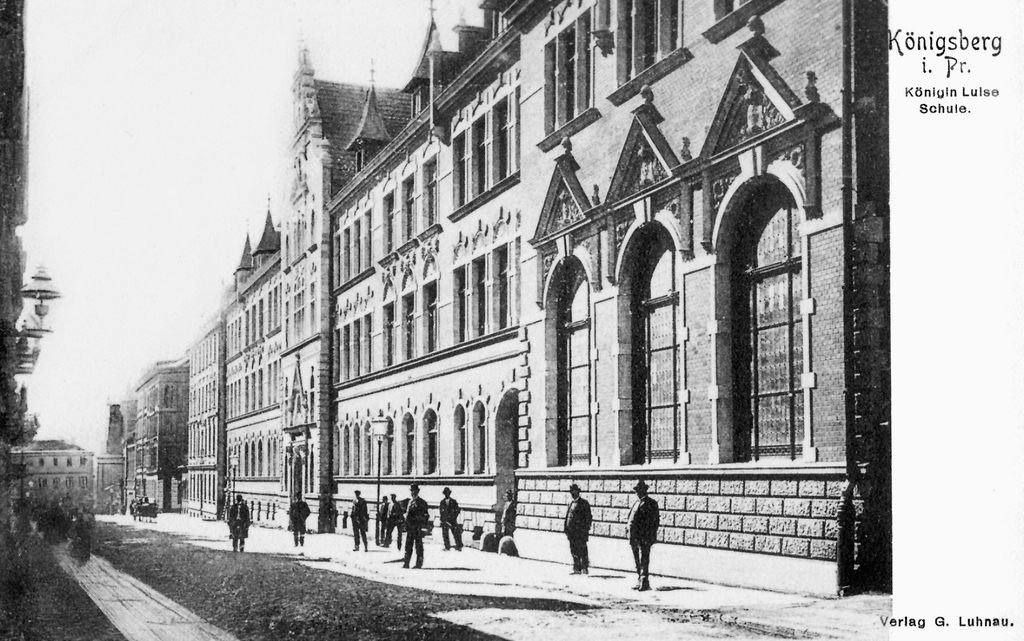 Königsberg